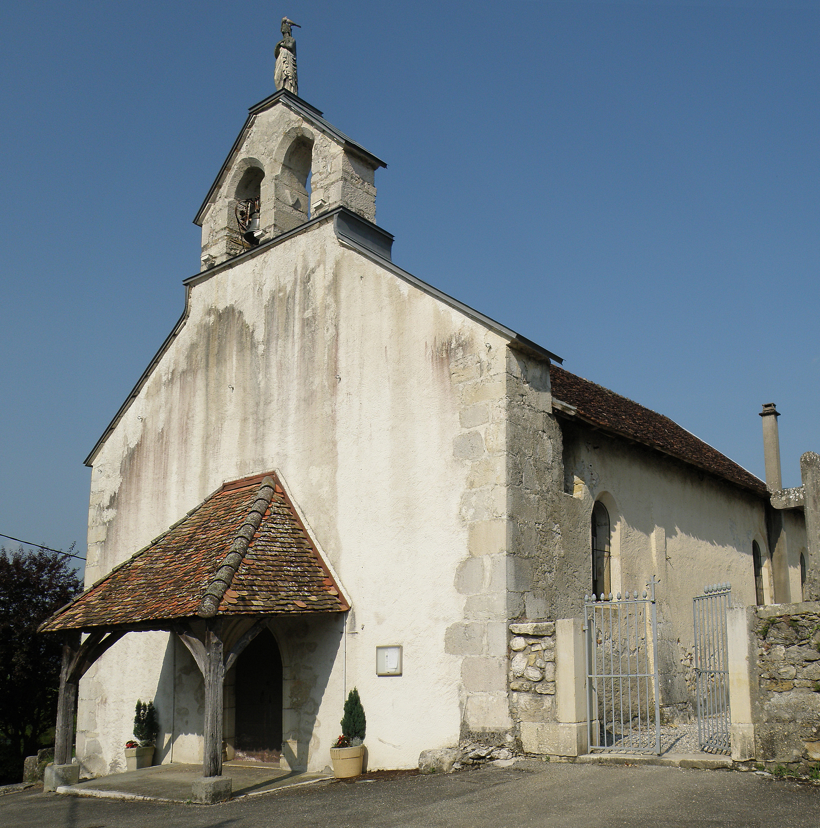 Nattages, comm. du département de l’Ain (région Rhône-Alpes, France), sur la rive droite (occidentale) du Rhône. Église paroissiale Saint-Pierre. Façade occidentale.